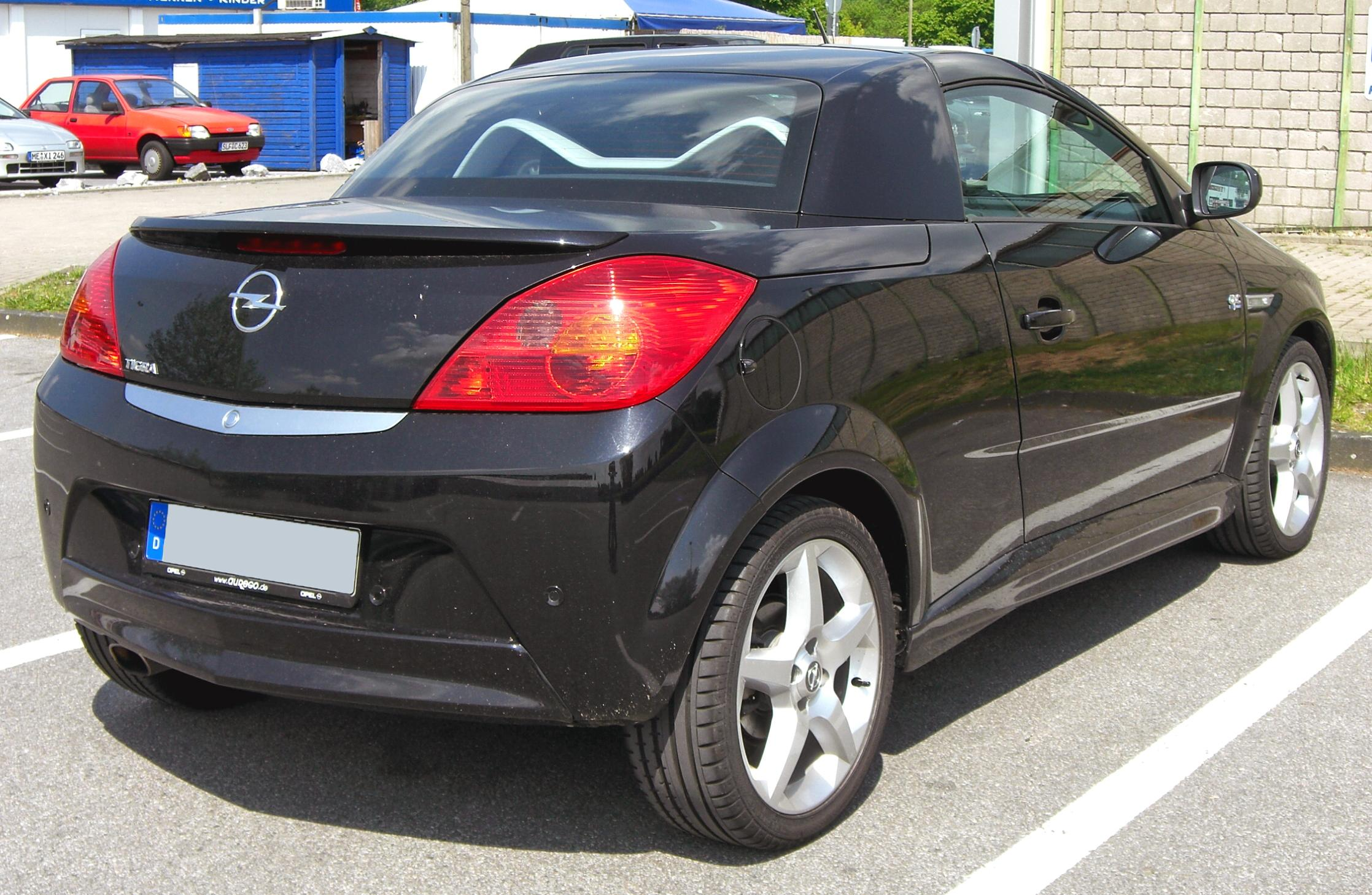 Opel Tigra TwinTop